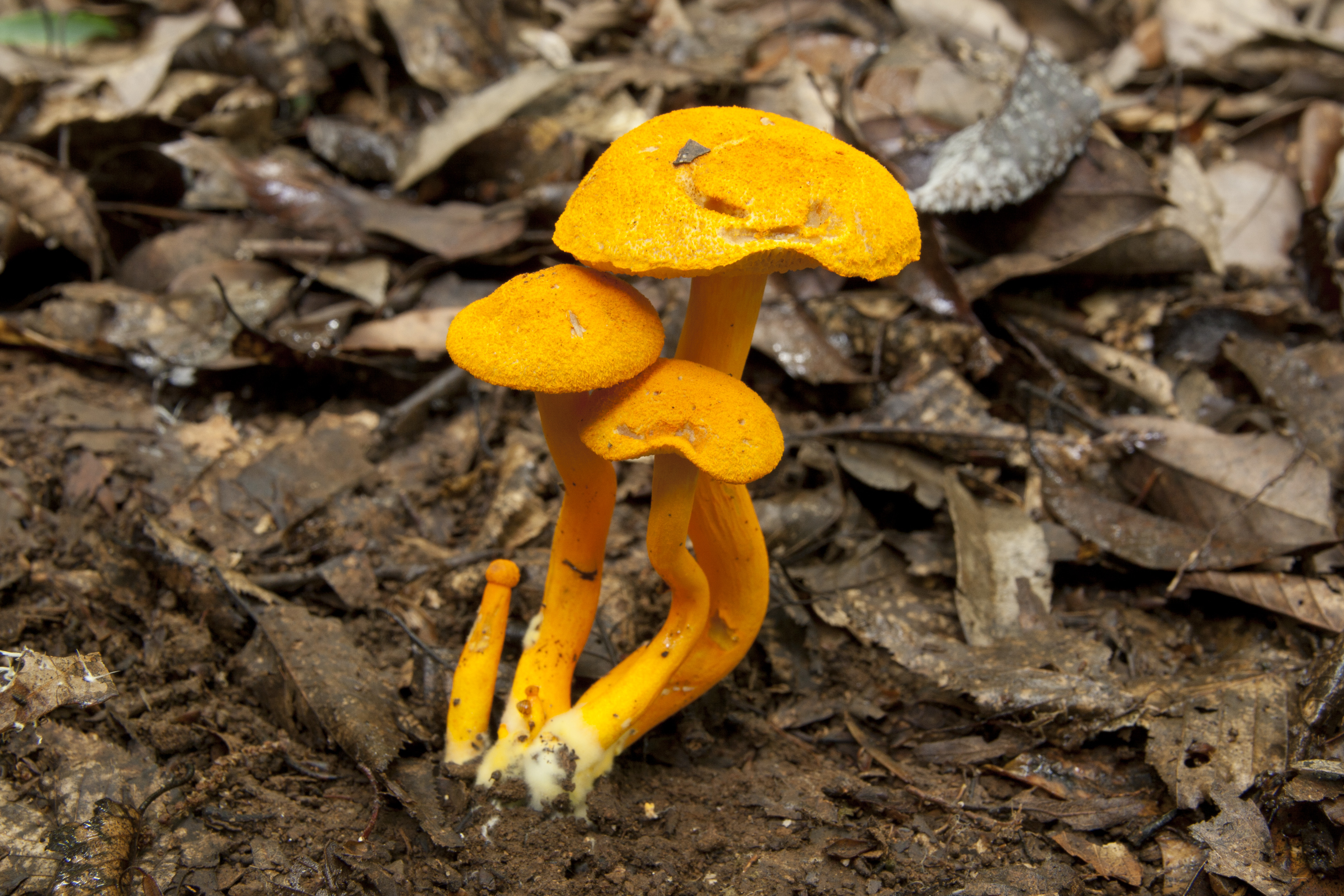 キイロイグチ属 ハナガサイグチ (学名:Pulveroboletus auriflammeus)